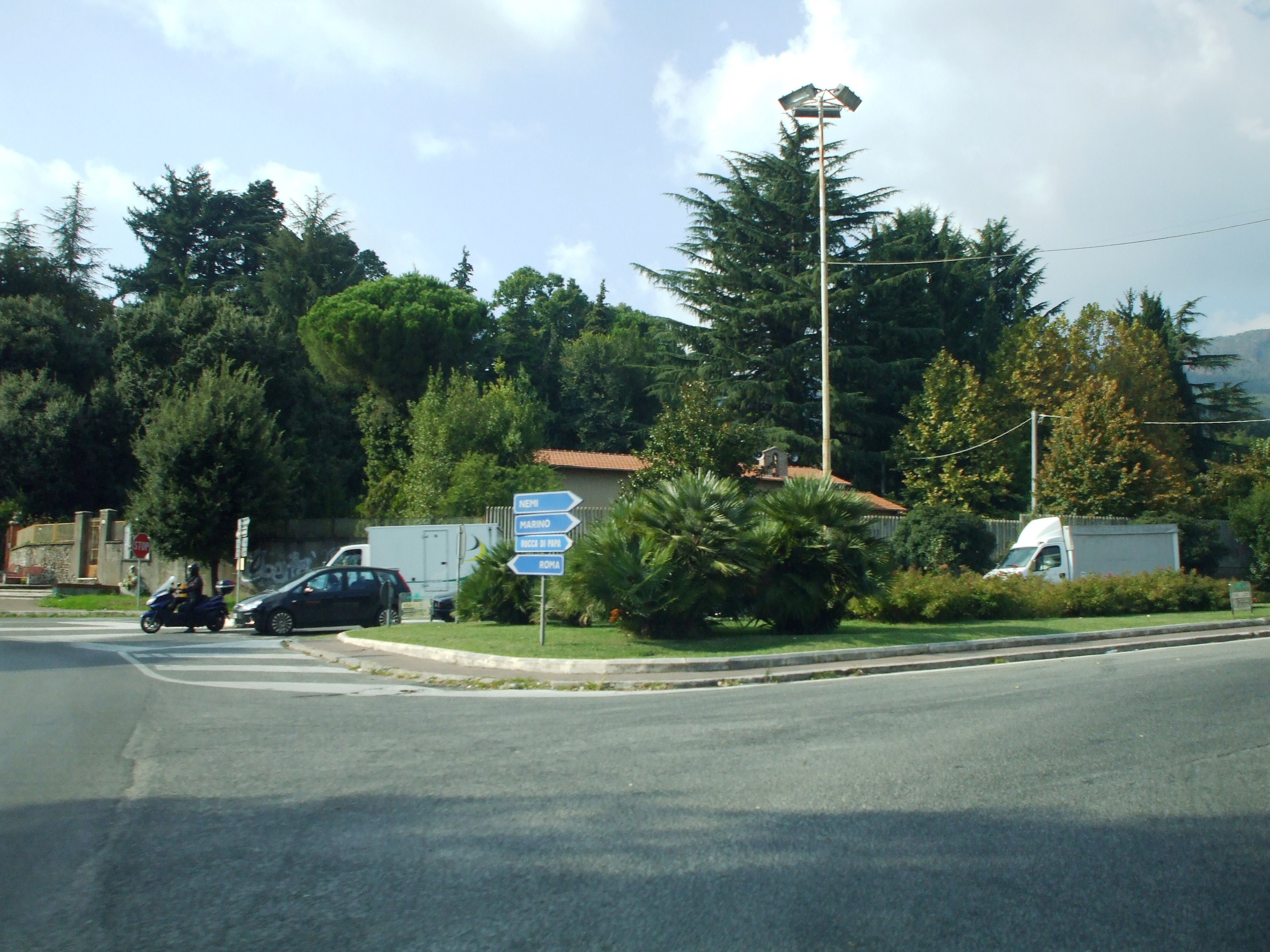 Velletri - Via Appia incrocio Via dei Laghi